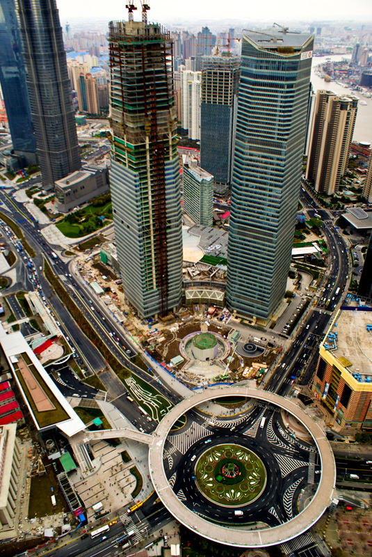 Shanghai ifc 上海國際金融中心